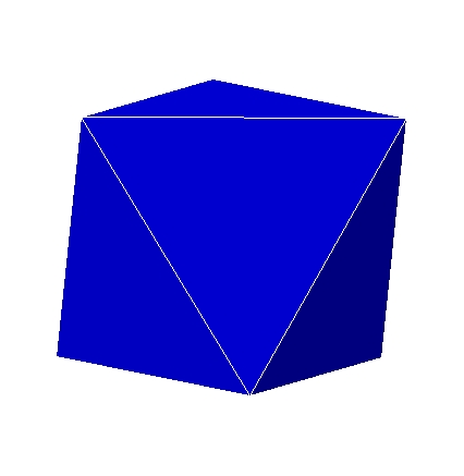 Octaedro